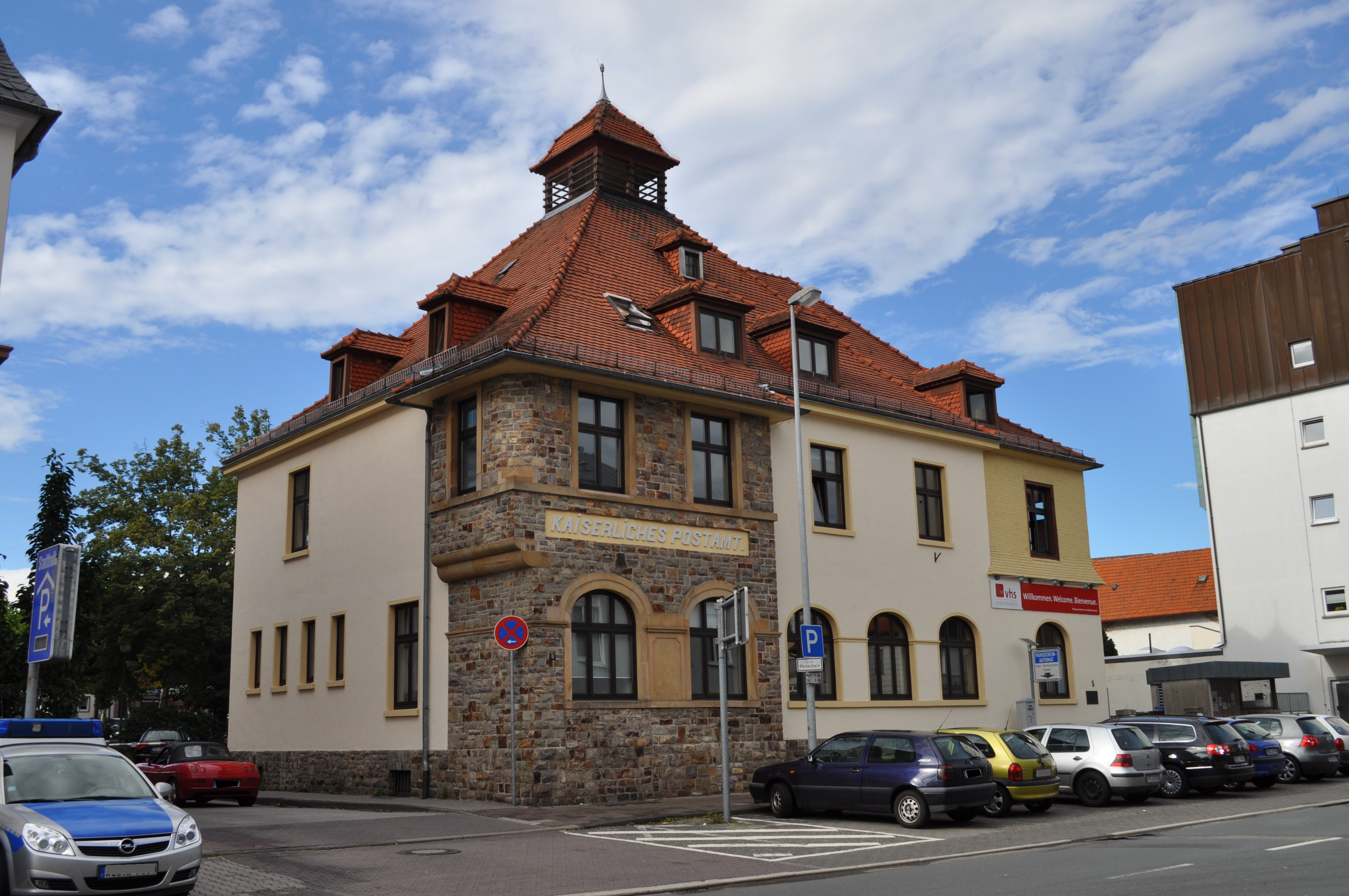 Oberursel, Kaiserliches Postamt